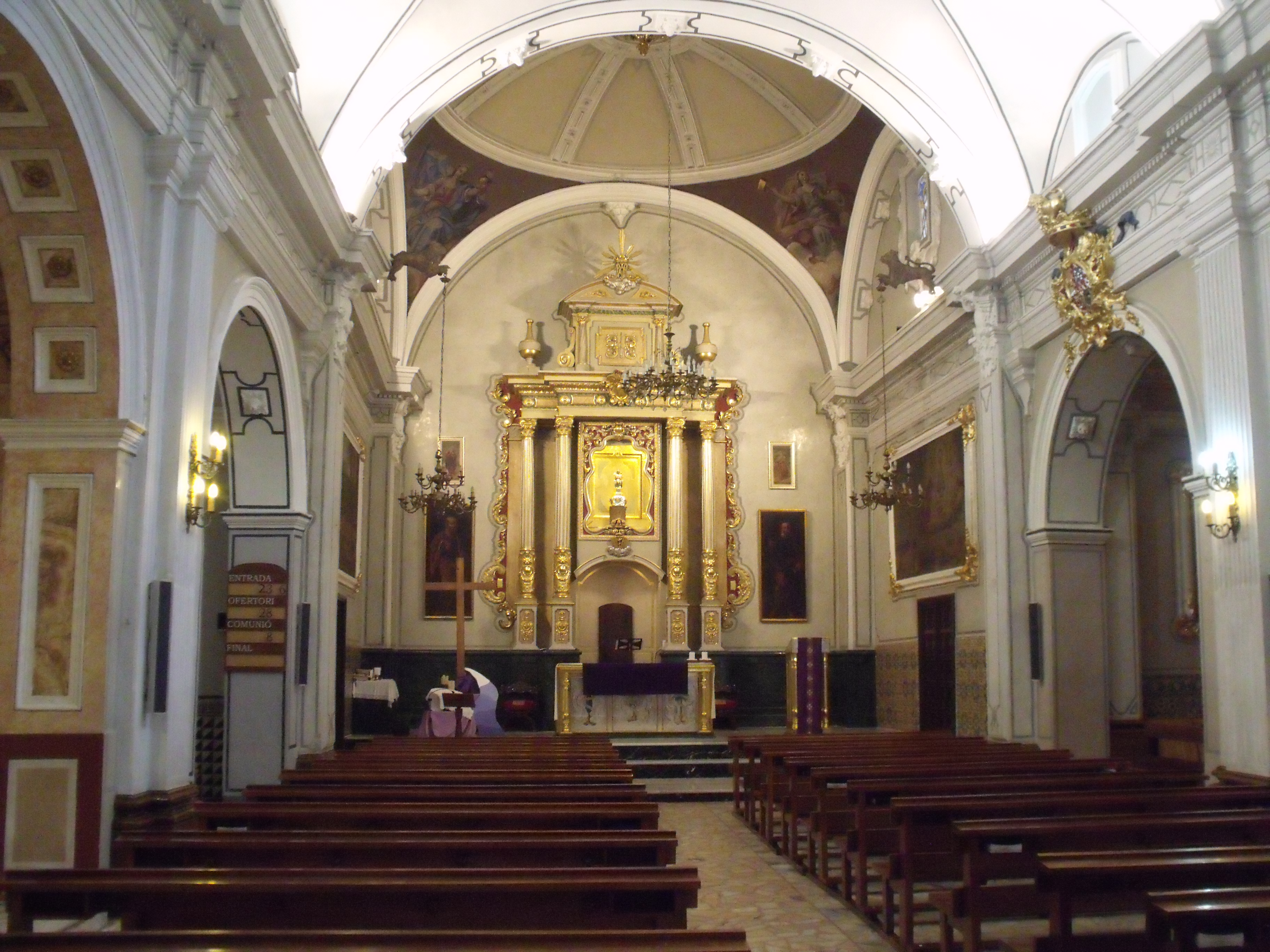 Nau central de l'Església Parroquial de la Mare de Déu de l'Olivar d'Alaquàs.